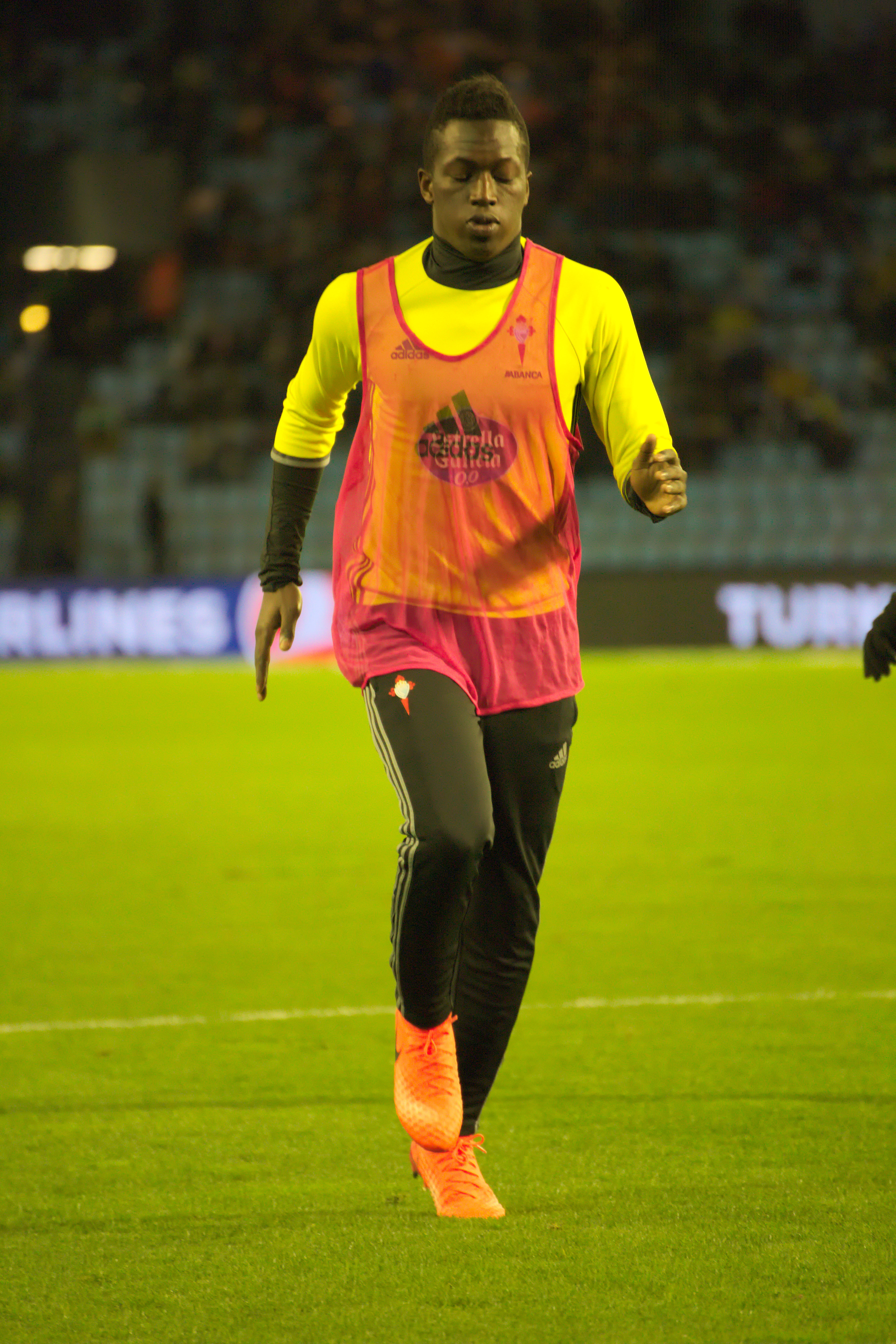 Pape Cheikh - RC Celta de Vigo